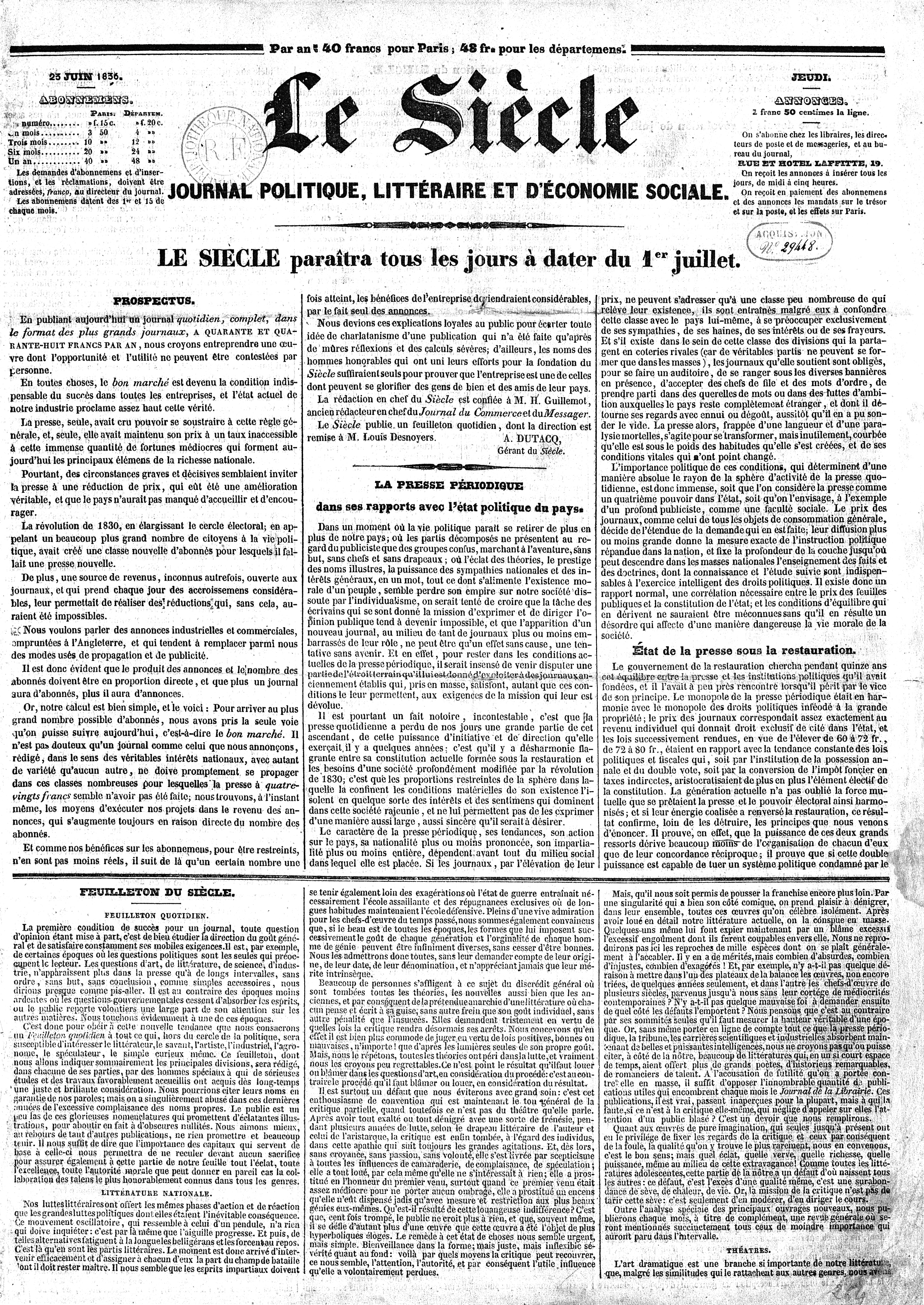 Prospectus of Le Siècle : journal politique, littéraire et d’économie sociale (1 July 1836 to 28 June 1932).